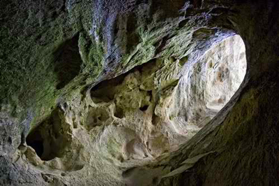 Српски (ћирилица): Ушачка пећина